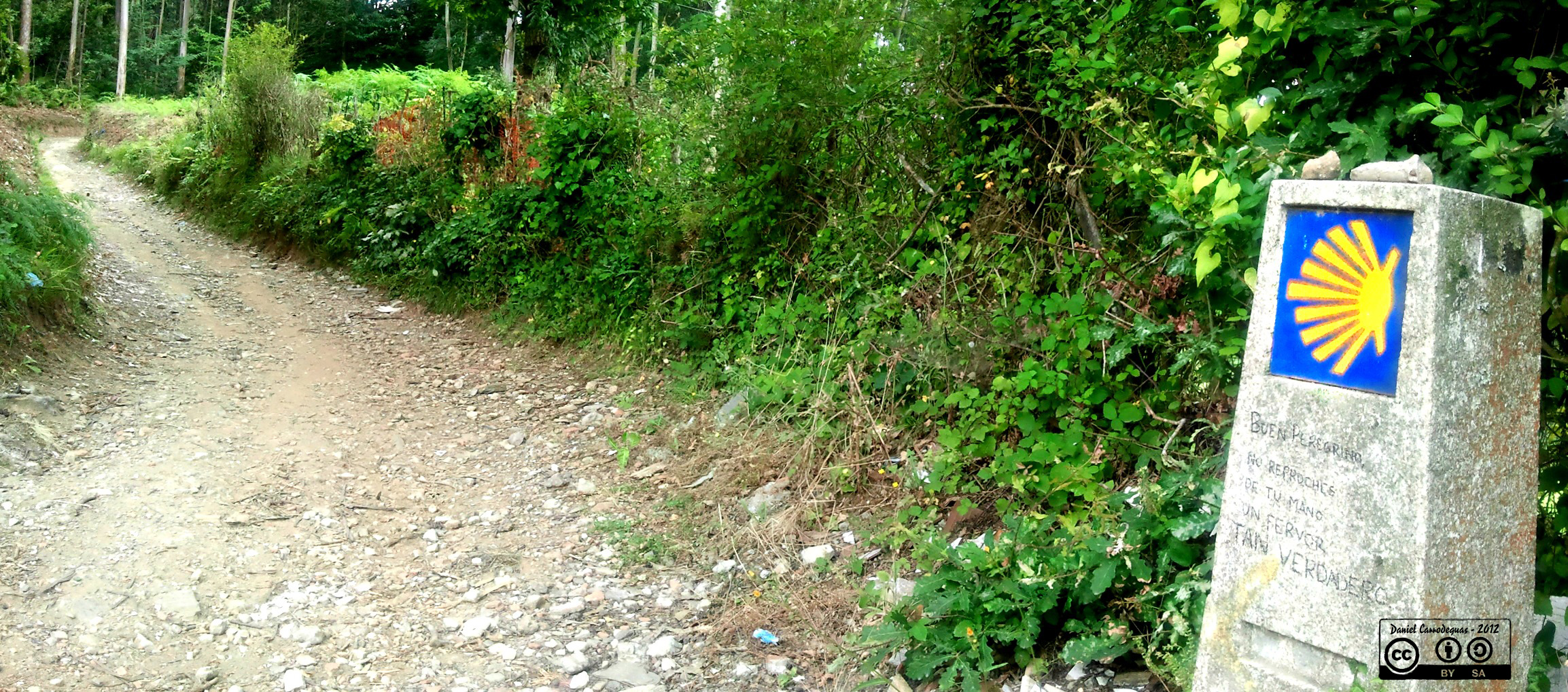 Camino Inglés, Camino de Santiago (Fene)